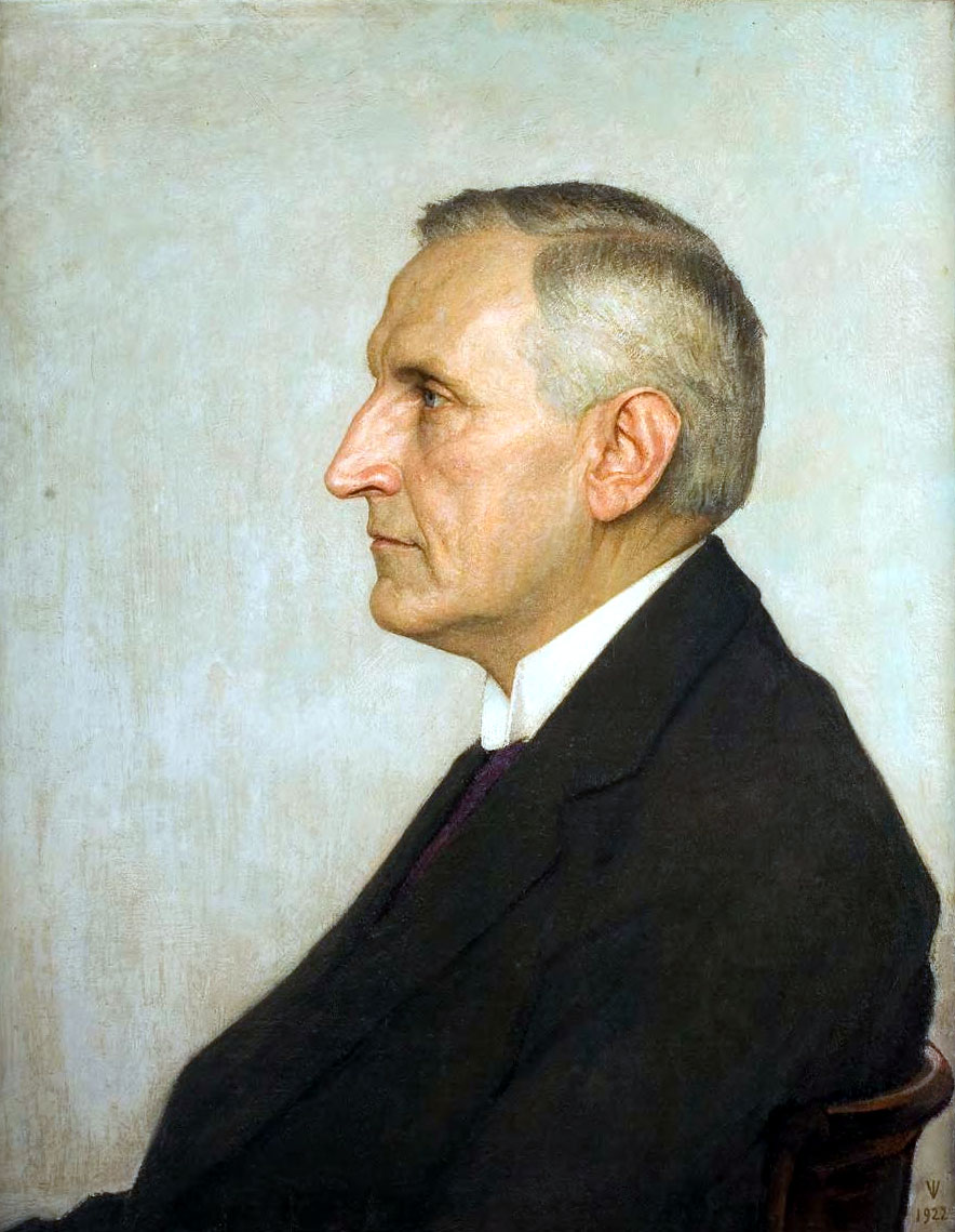 Leids hooglerarenportret van Johannes Petrus Kuenen, Bijzondere Collecties, Universiteitsbibliotheek Leiden